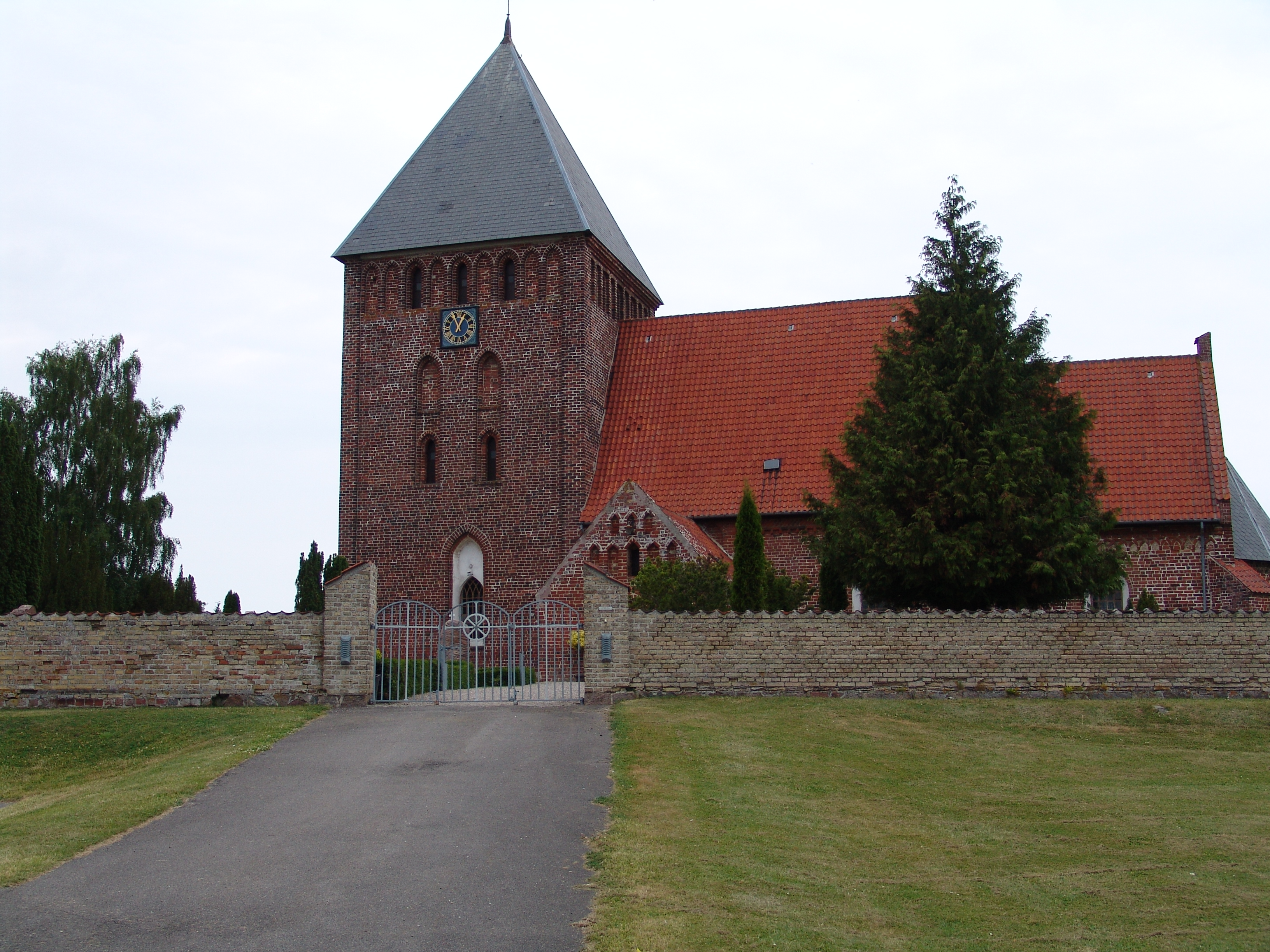 Østofte Kirke nær ved Nørreballe